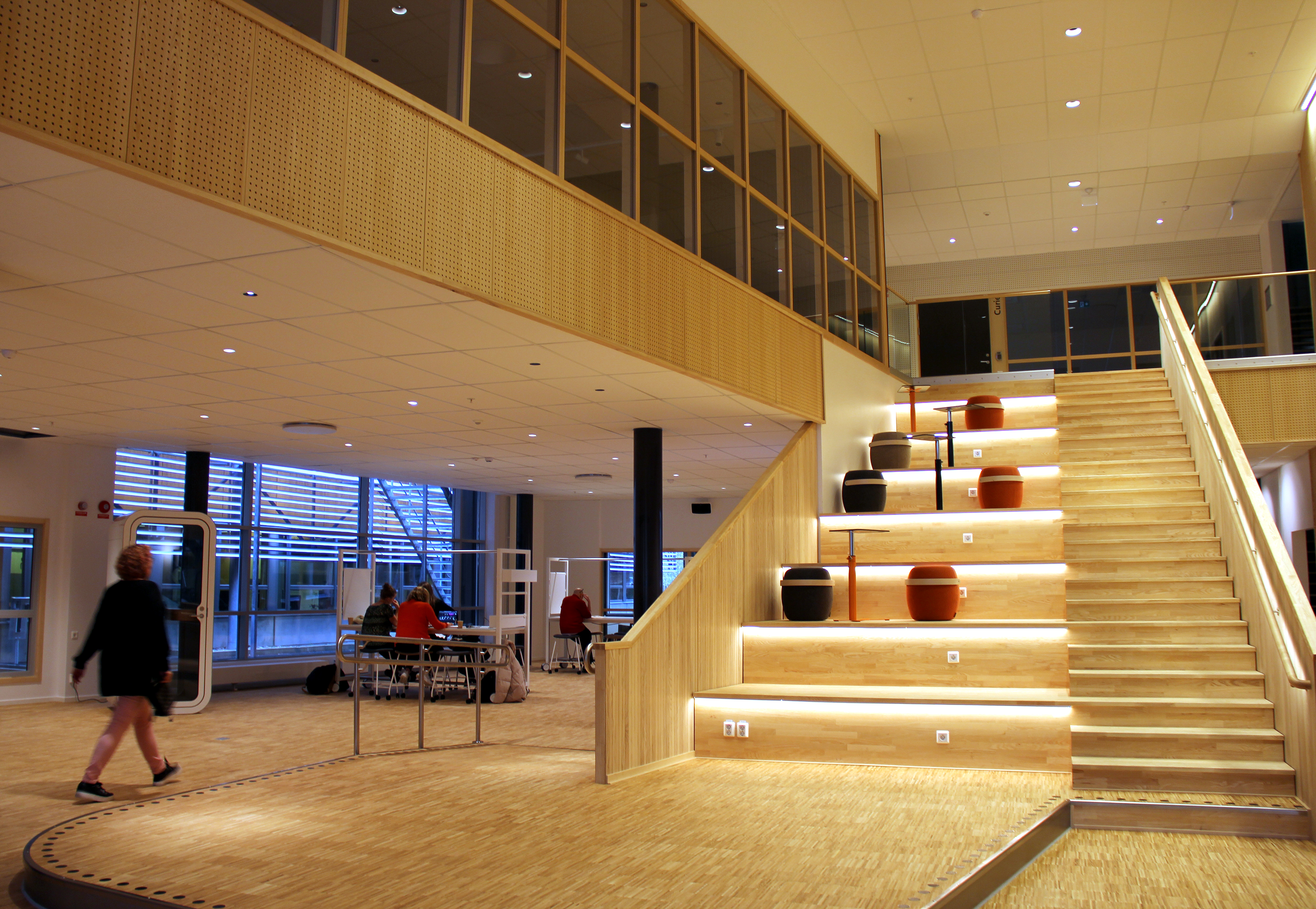 Mötestrappan mitt i hjärtat av Videum Science Park